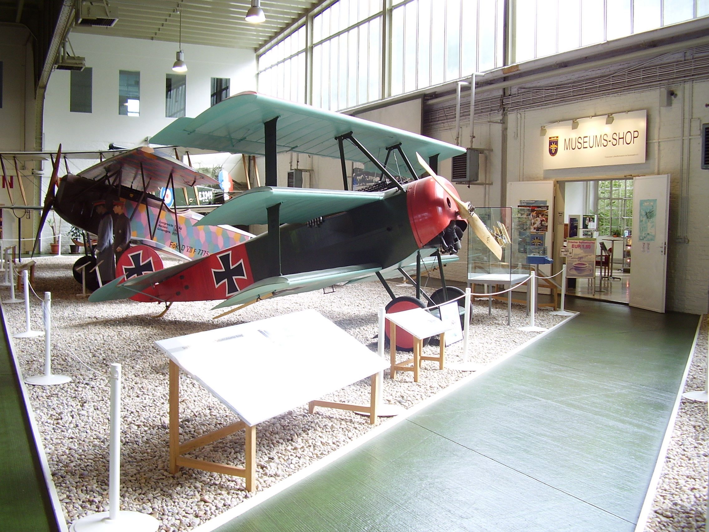 From left to right: Fokker D.VII, Fokker Dr.I. Luftwaffenmuseum der Bundeswehr; Airforce Museum of the Bundeswehr; Berlin-Gatow